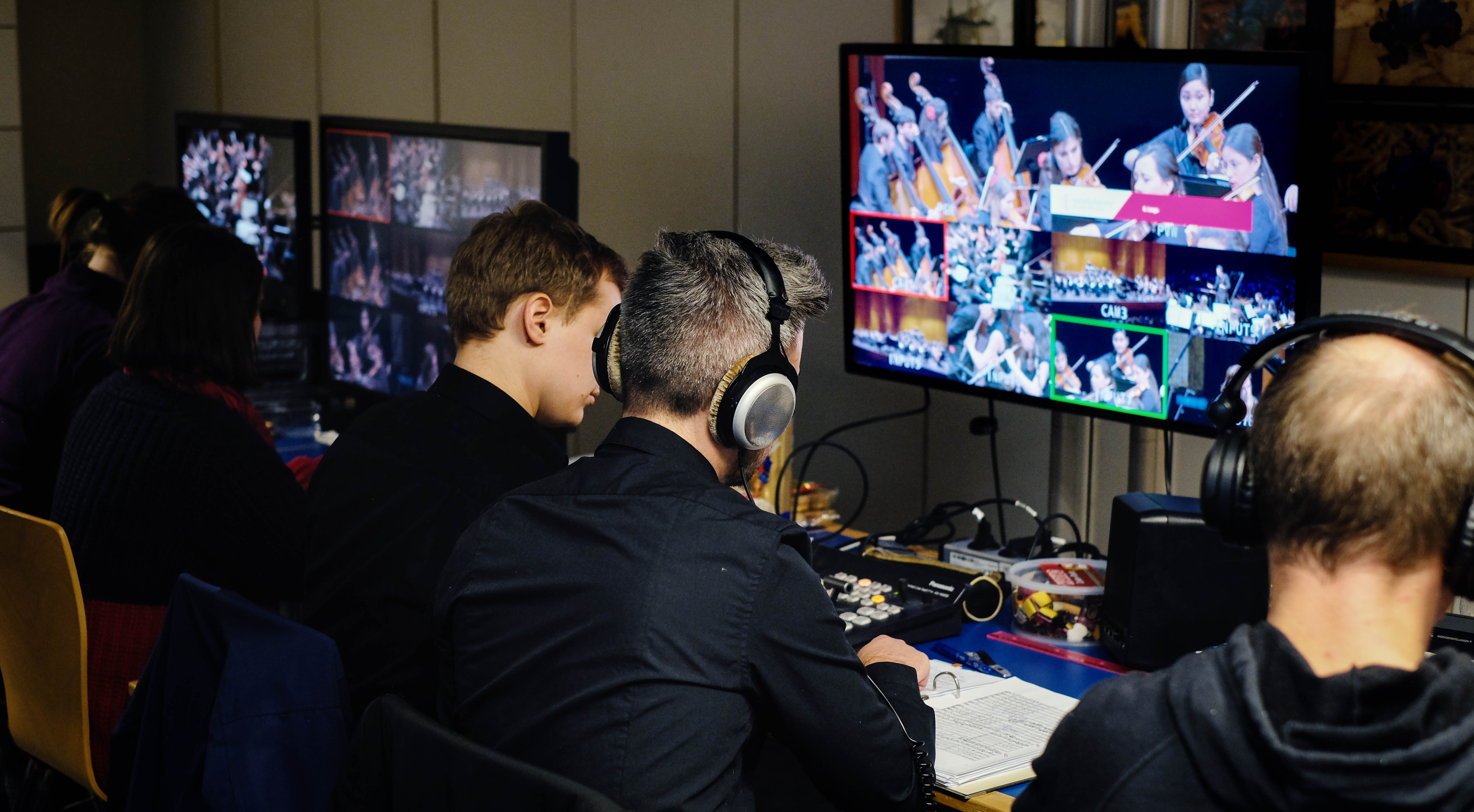 HomeSymphony Regie